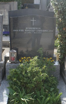 Grab Karl Randolf